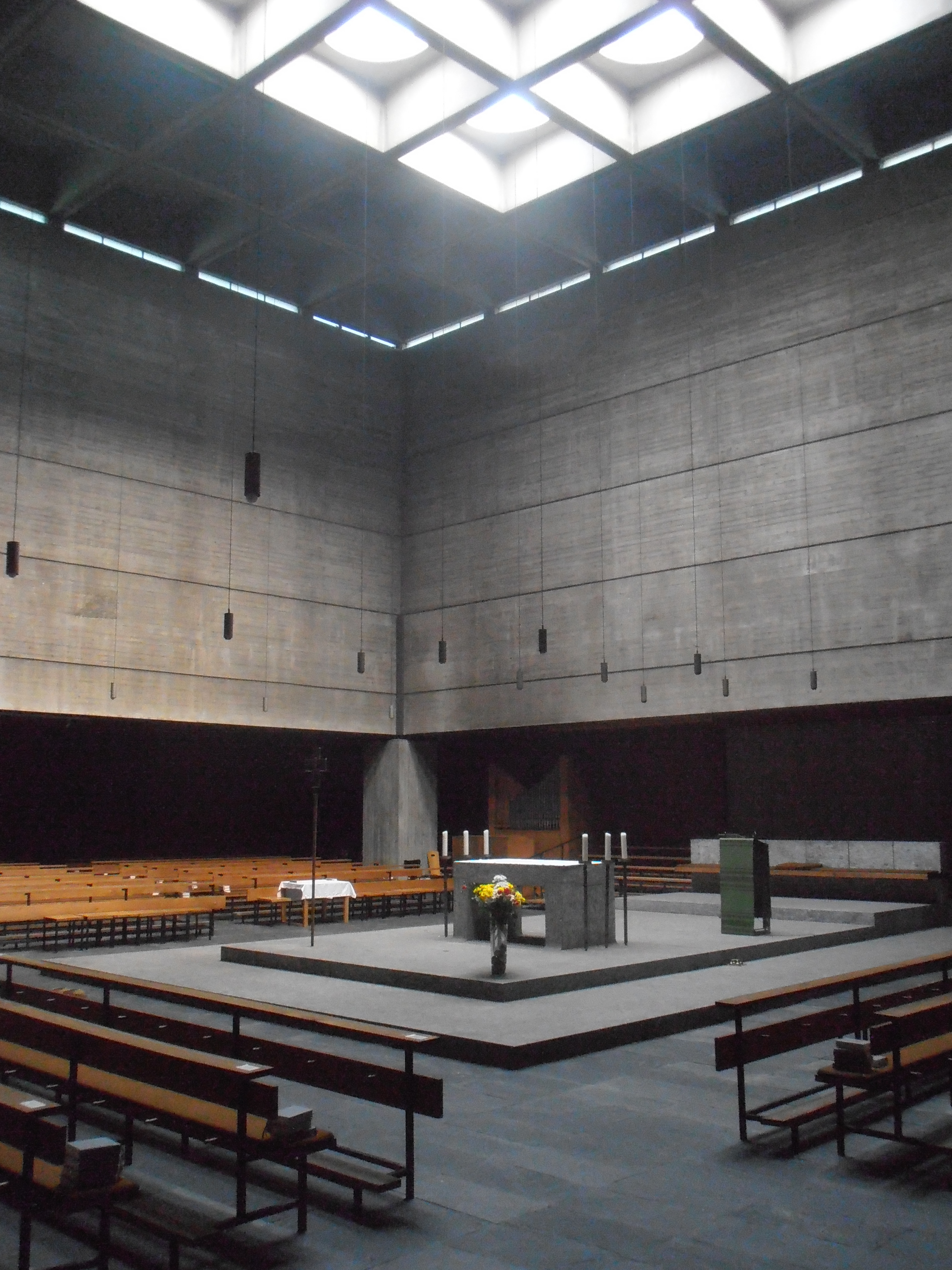 St. Mauritius (München) Kirchenraum